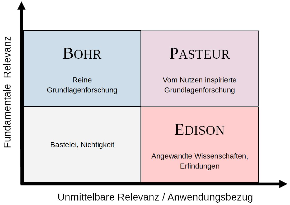 Systemisches Schema der Forschungsgattungen nach Donald E. Stokes